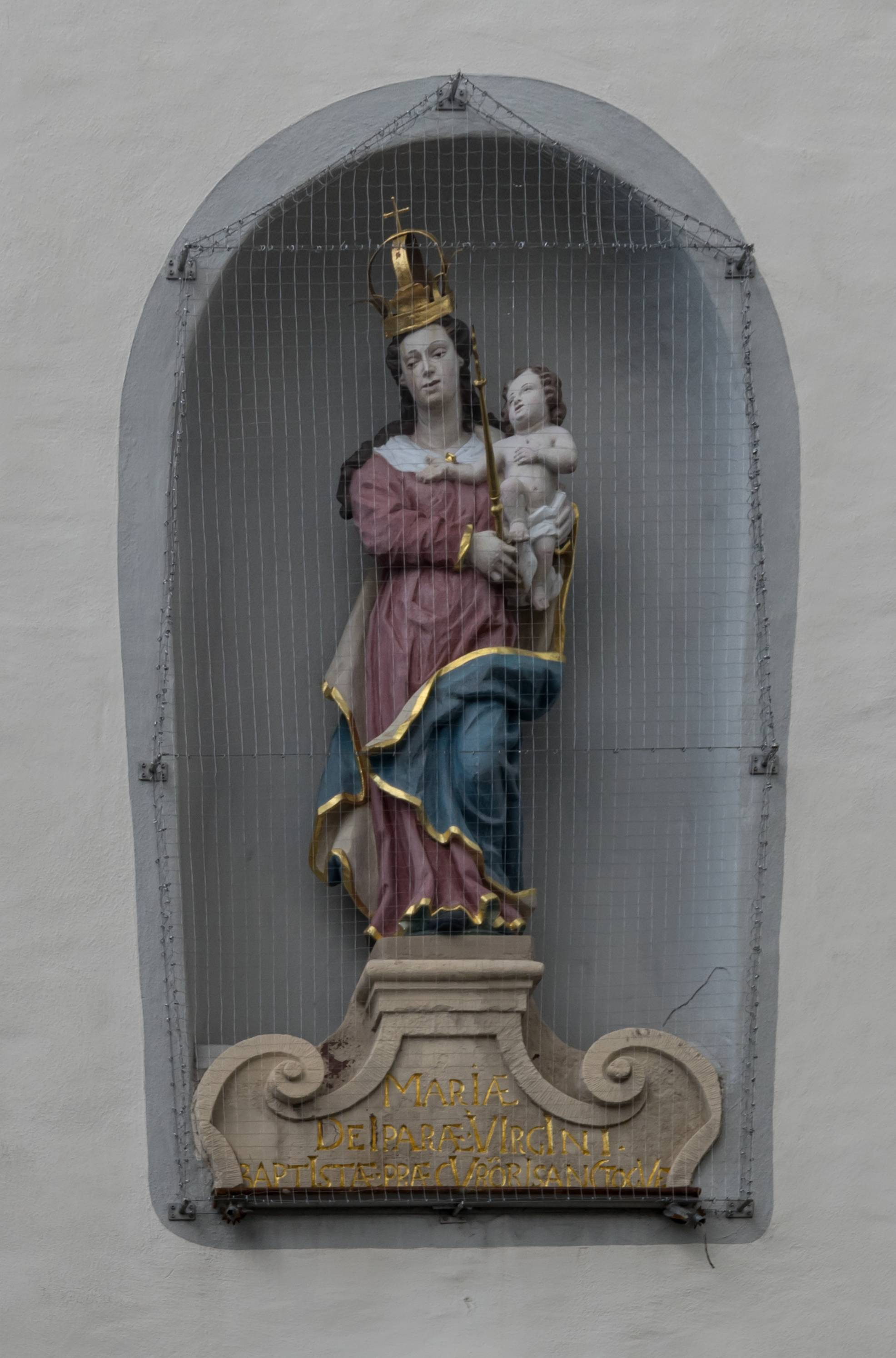 Bilder von St. Columba. in Pfaffenweiler Marienfigur über dem Haupteingang